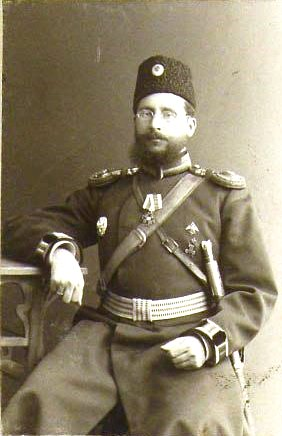 Александр Иванович Мякутин (4 октября 1876 — 8 мая 1918) — известный фольклорист, военный юрист, полковник Оренбургского казачьего войска, член Всероссийского учредительного собрания